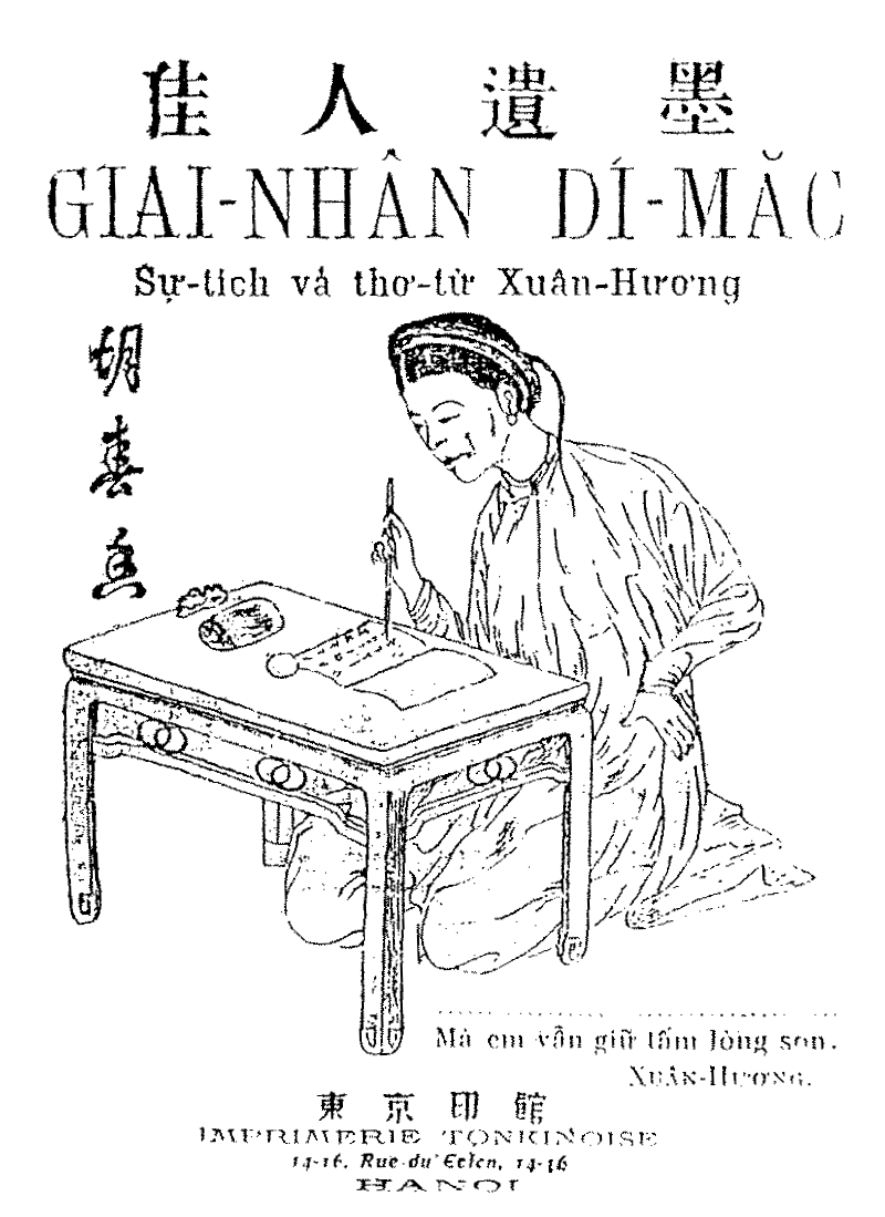 胡春香 《佳人遺墨》